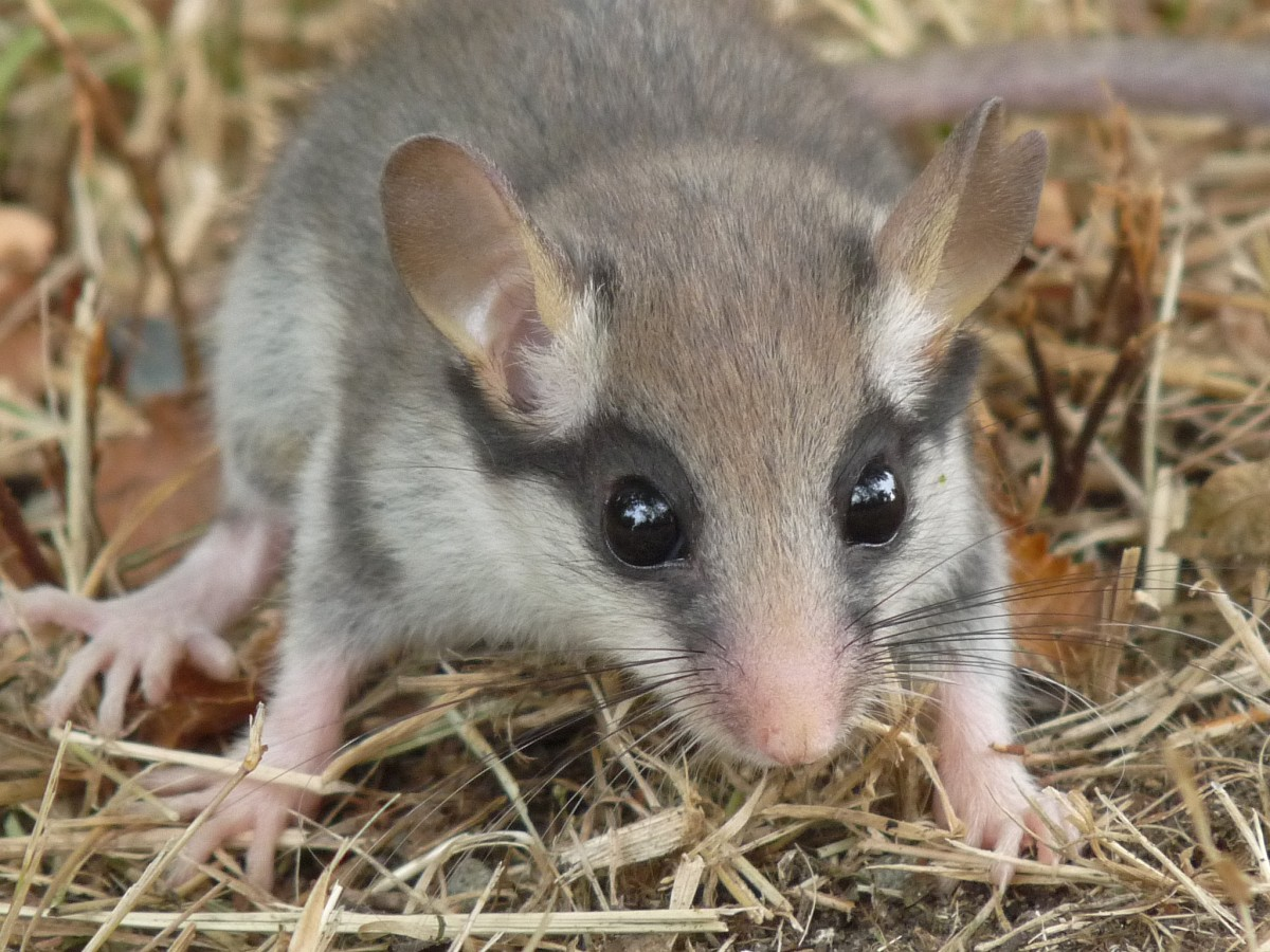 Lerot près d'une haie, Talmont, Charente-Maritime, France